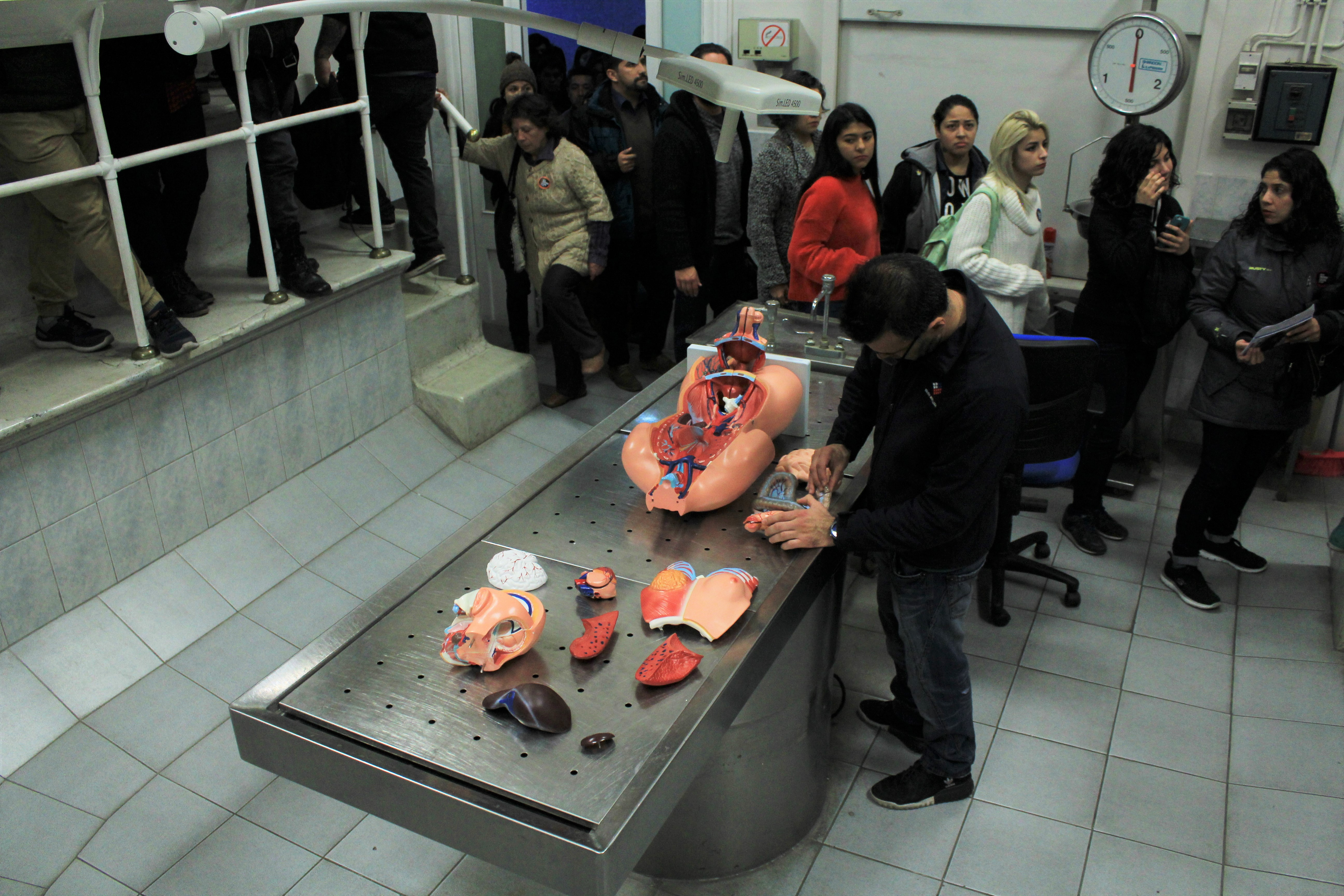 Sala de autopsias del Servicio Medico Legal (SLM) en 2018